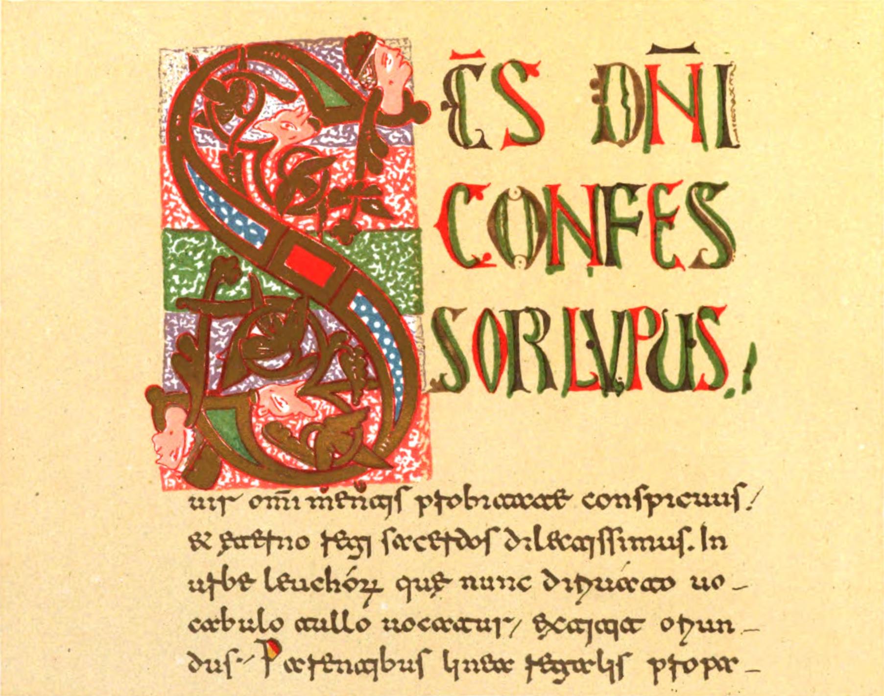 Lezionario del XII secolo dall'abbazia di San Lupo di Benevento. Codice n. 5 dell'Archivio della Badia di Cava. Inizio della legenda di San Lupo di Troyes, fol. 64v